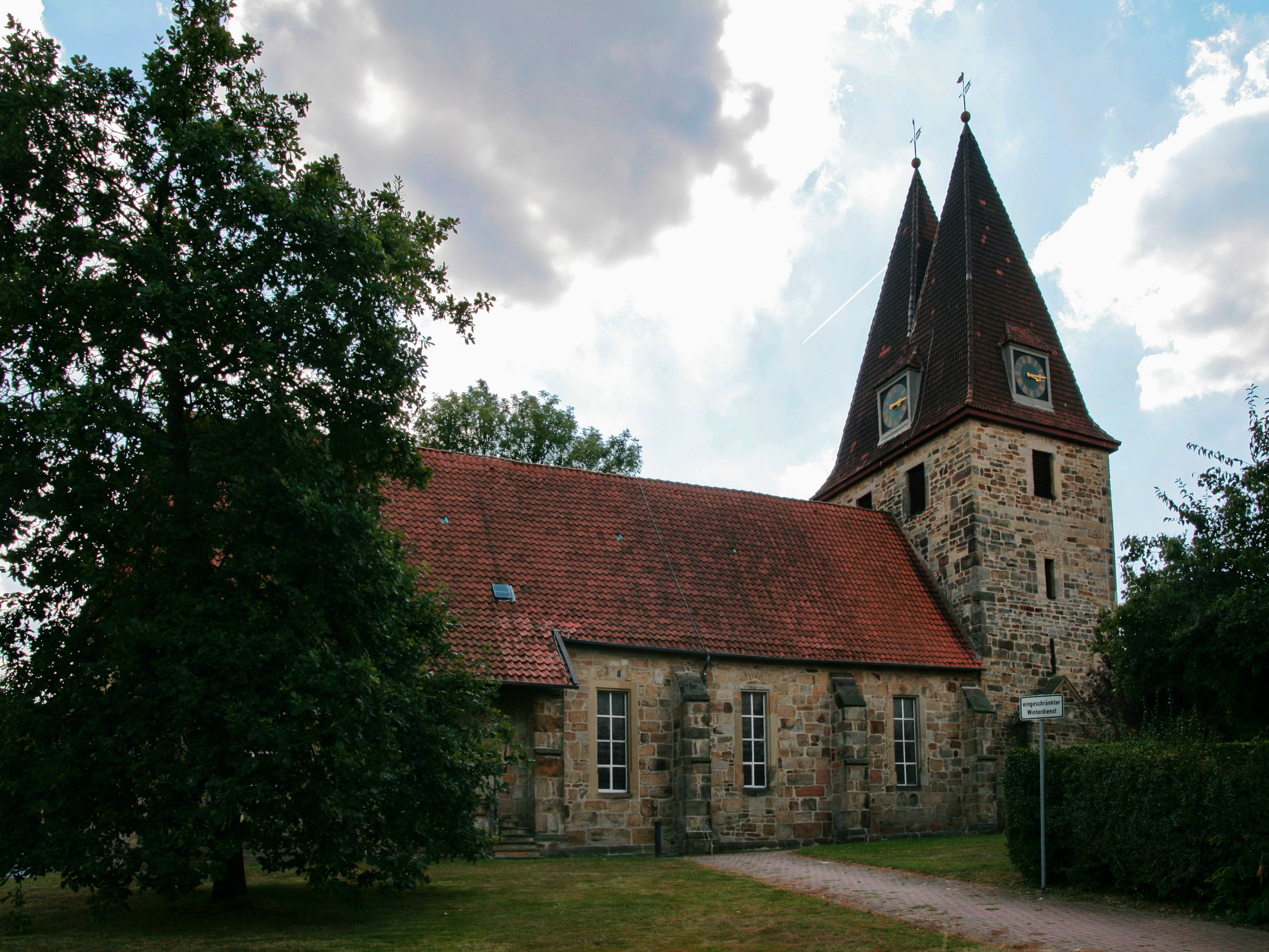 In Deutschland, Niedersachsen: St. Thomas Kirche in Hohenbostel (Barsinghausen)